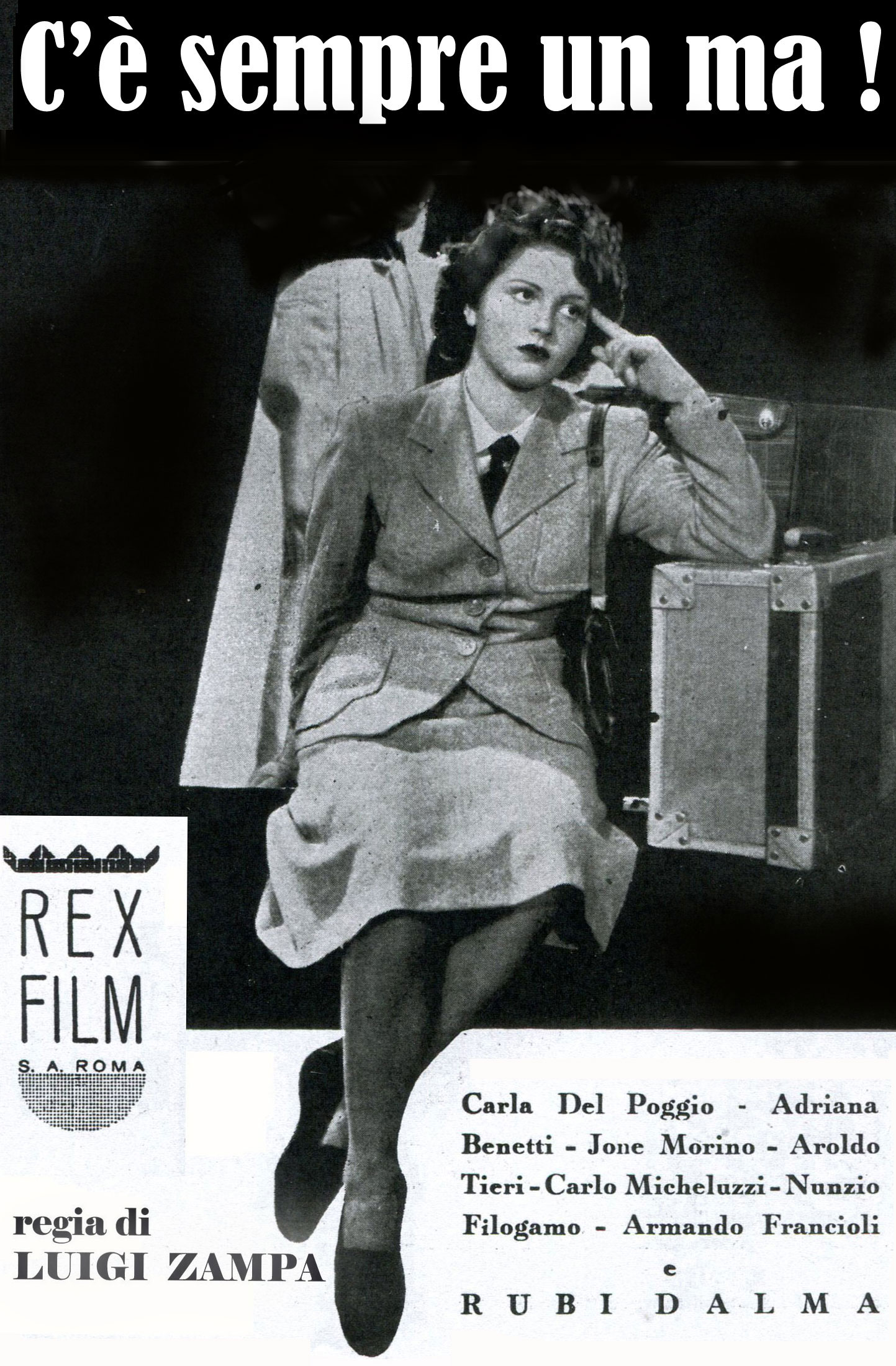 Immagine promozionale di "C'è sempre un ma!" (Zampa, 1943)